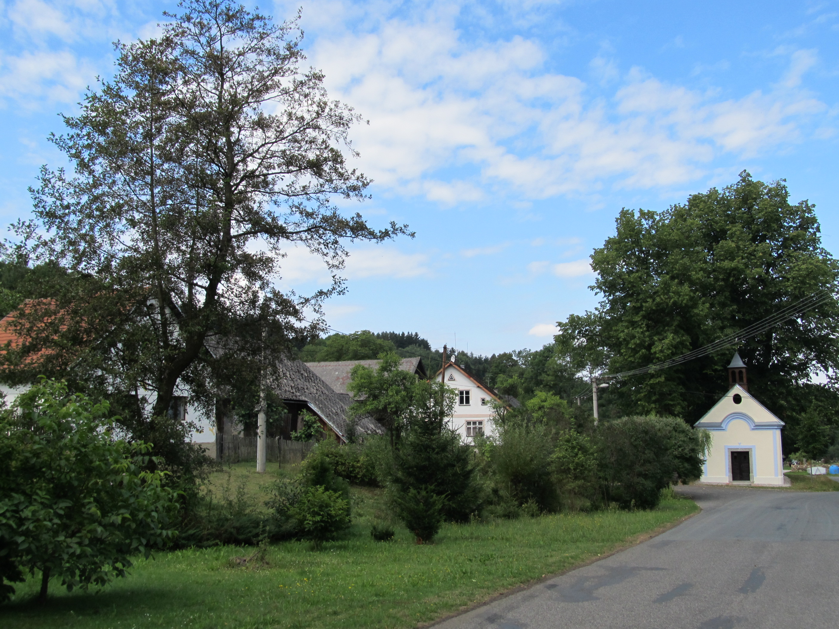 Březí - náves